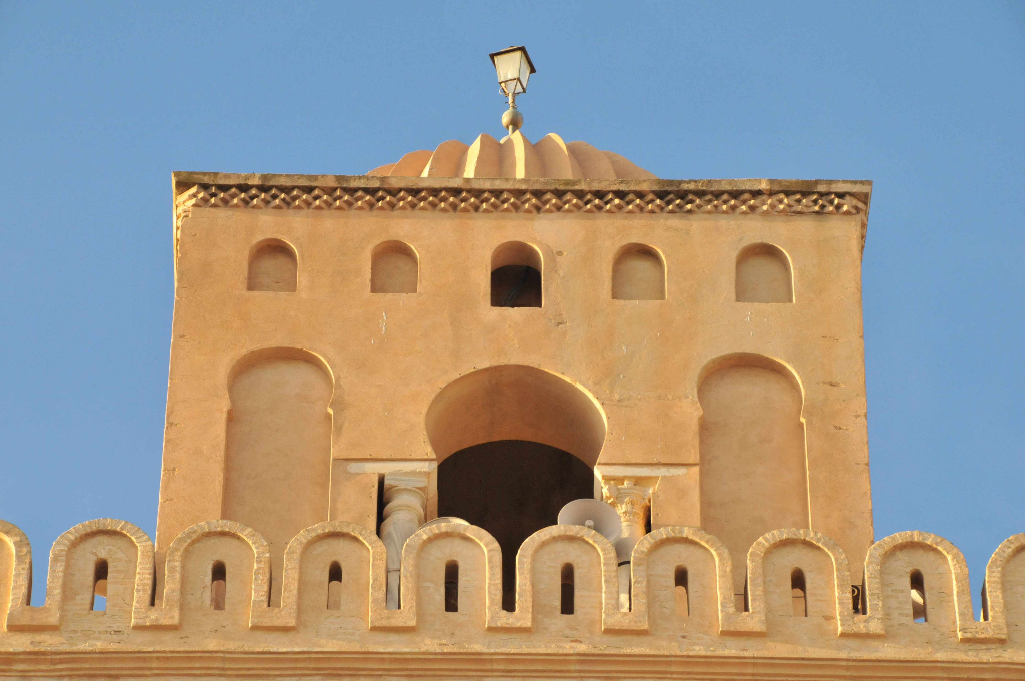 Gros plan sur le dernier niveau du minaret de la Grande Mosquée de Kairouan, en Tunisie.